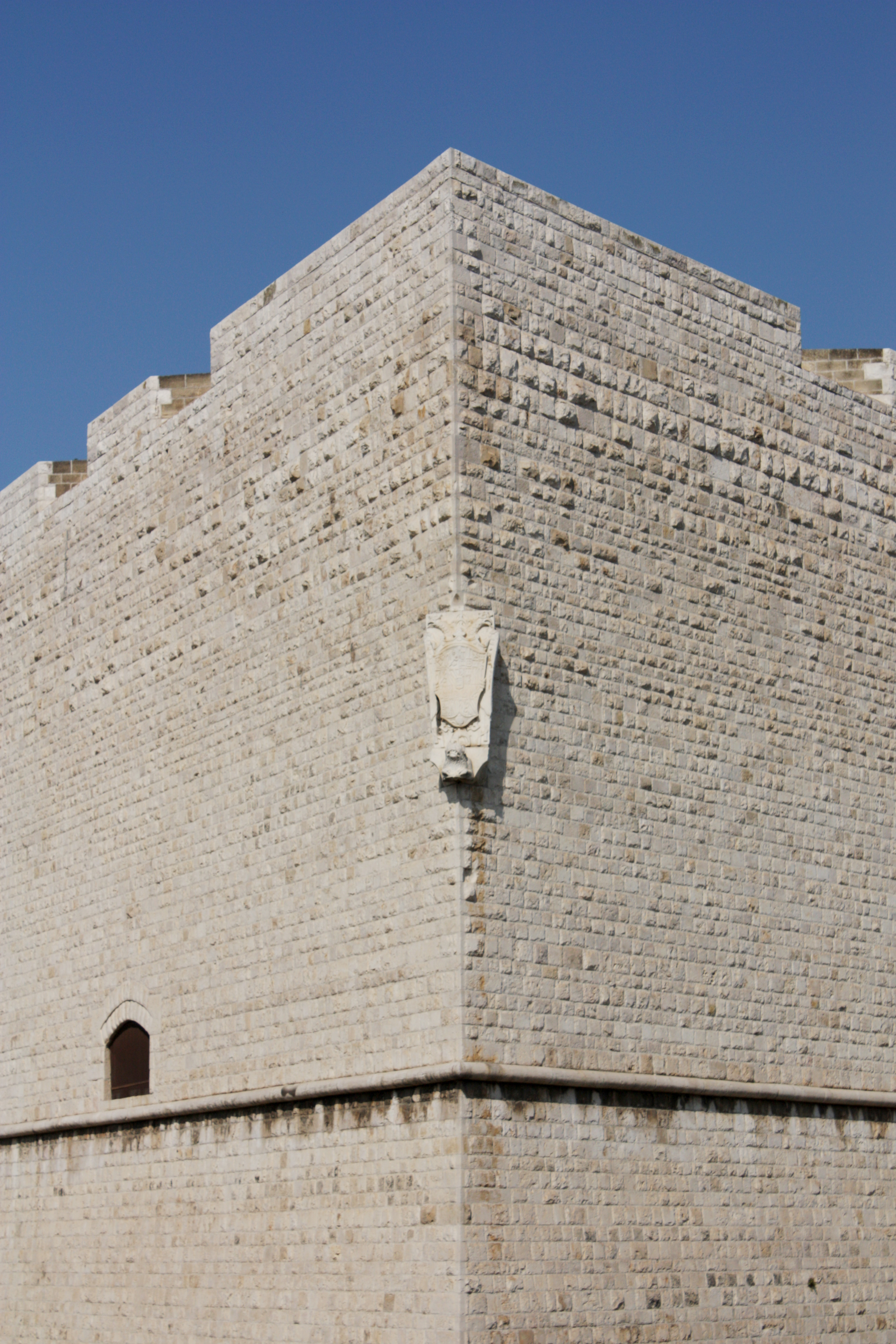 Castello di Barletta - particolare del bastione sud-est in cui è visibile lo scudo della dinastia aragonese.